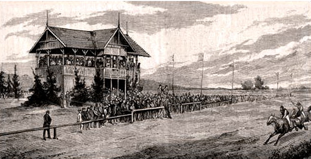 Rycina "Wyścigi w Pławnie" (29.09.1881). Autor: Edward Nicz